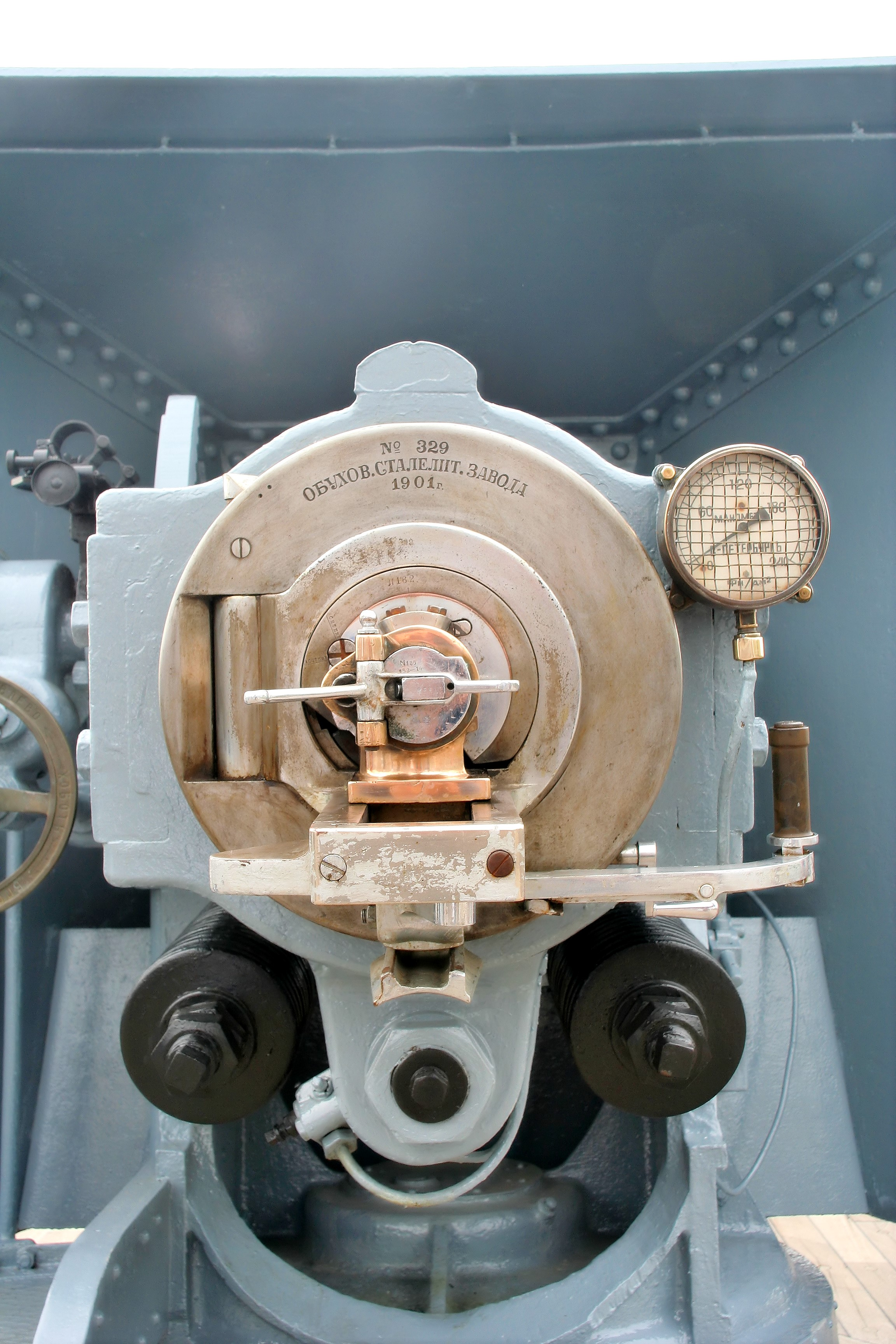 RUS Cruiser Aurora front gun detail.jpg